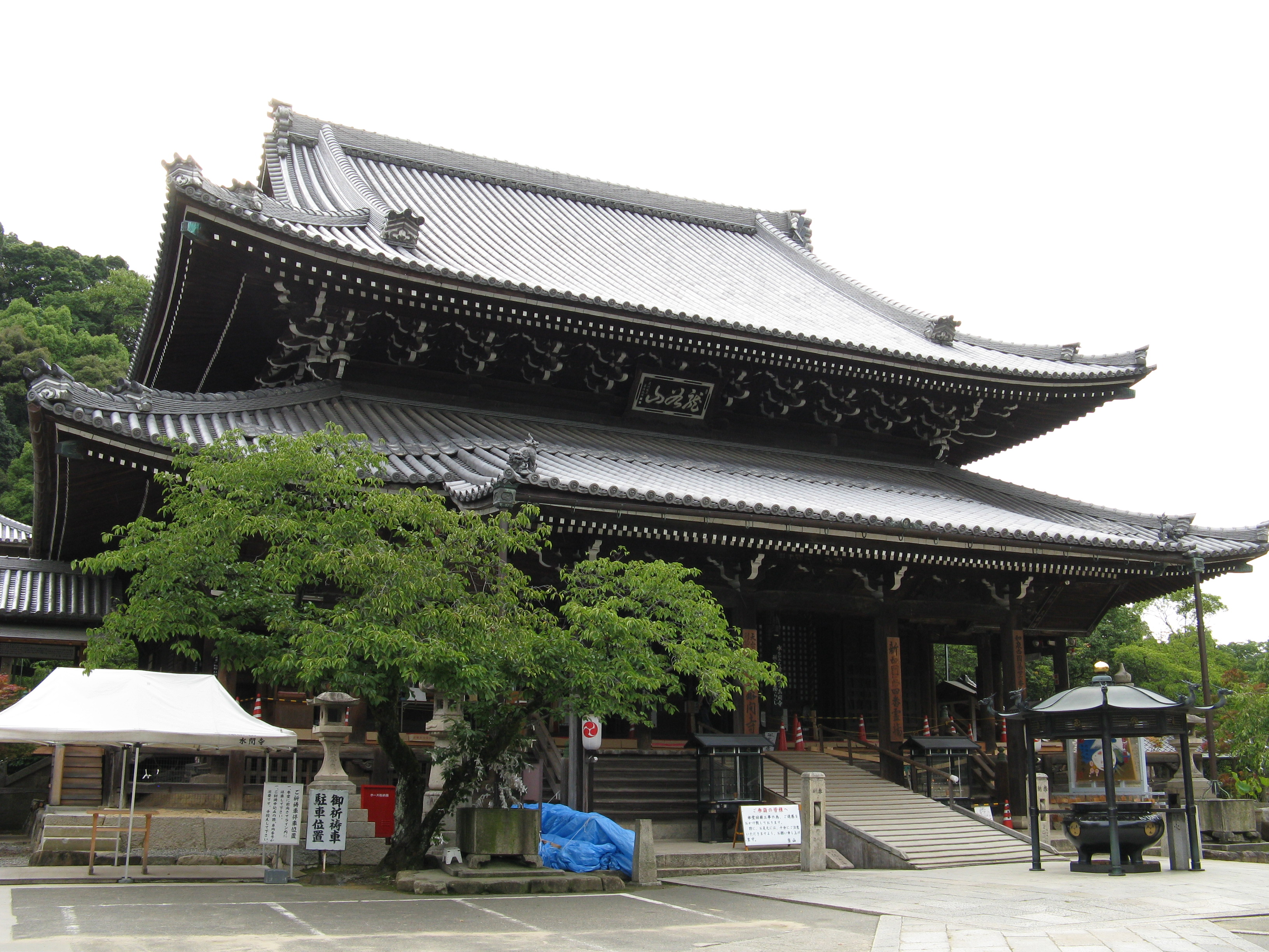 水間寺 本堂